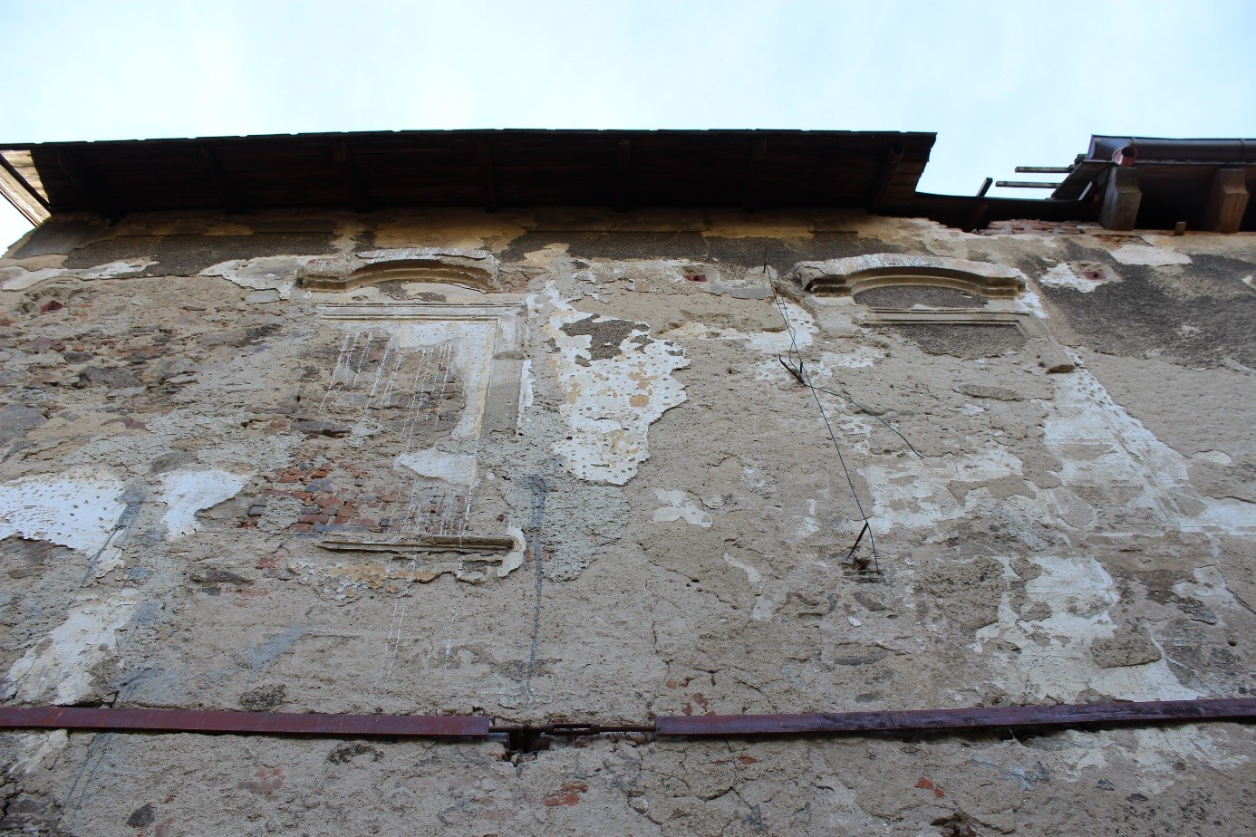 Vodní tvrz Popovice (okres Benešov) Pohled z nádvoří na východní stěnu věže před zahájením prací na navýšení věže a jejím zastřešení. \Dvě barokní slepá okna.Na snímku je vidět původní provizorní zastřešení.